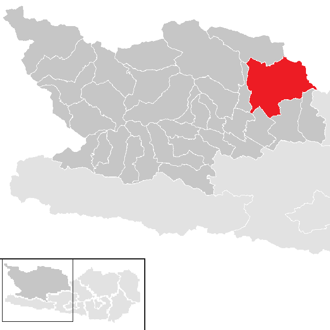 Bezirk Spittal an der Drau